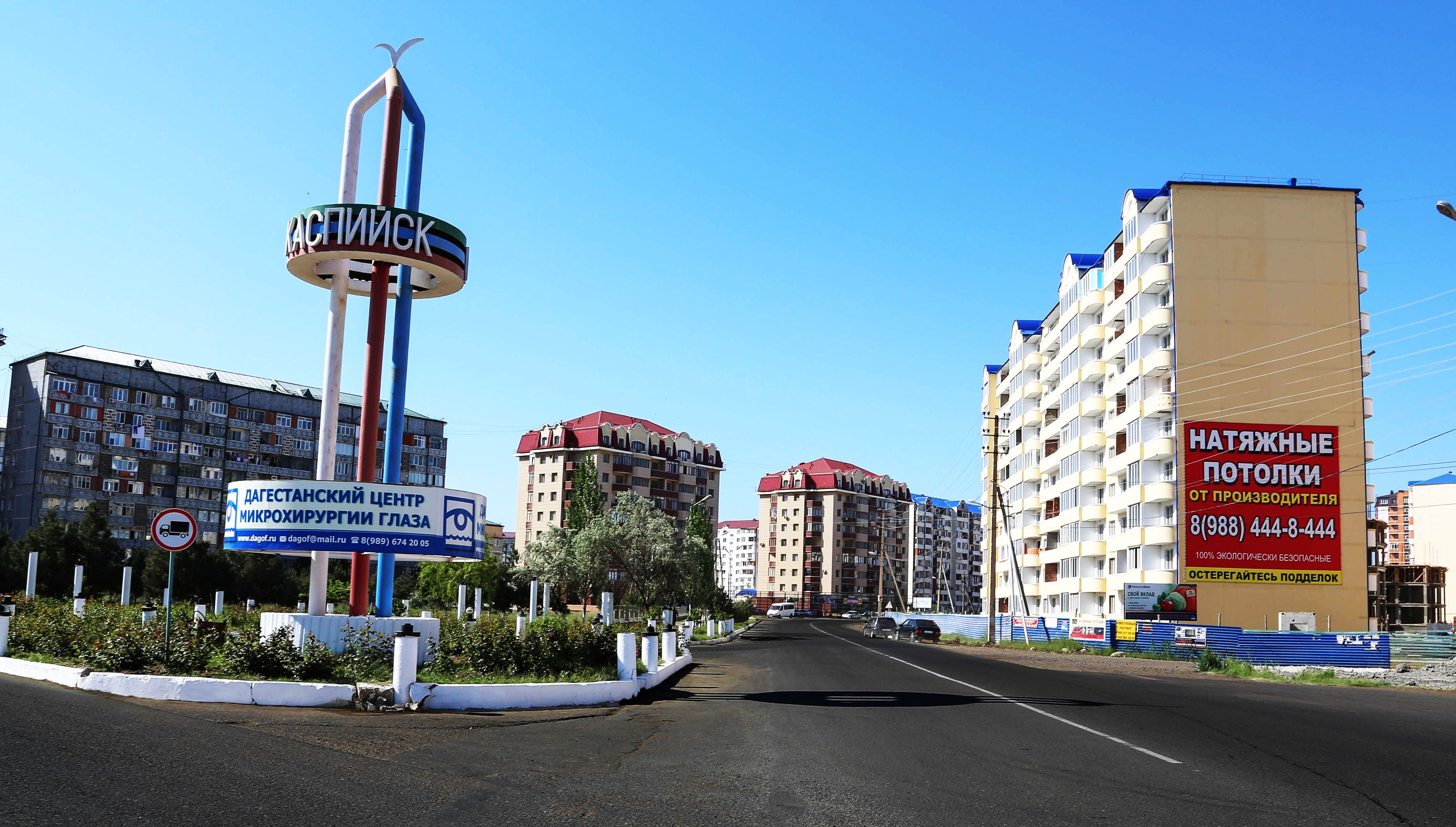 город Каспийск